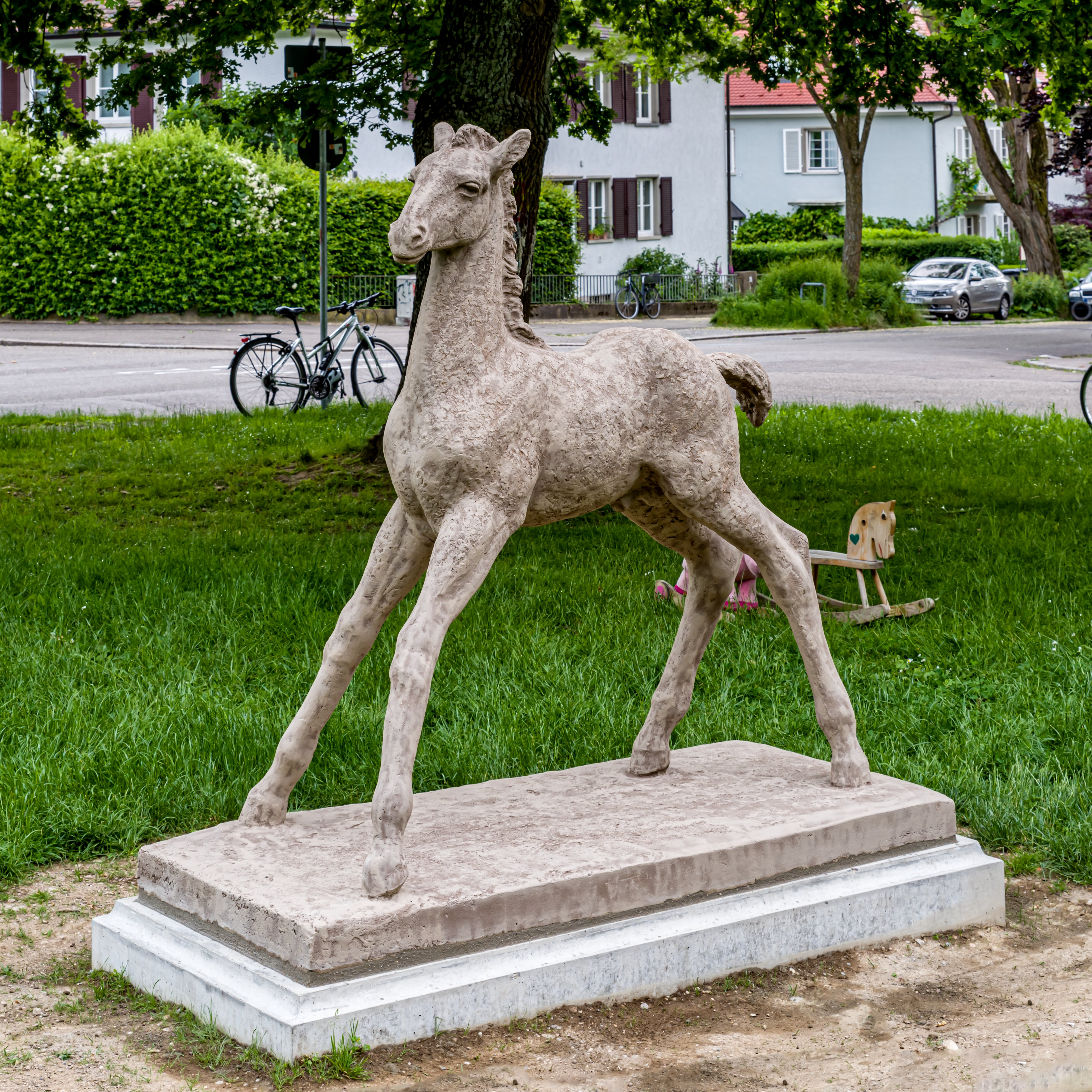 Bilder aus Freiburg im Breisgau Das Holbeinpferdle am 03.06.2019 15:50 unmittelbar nach dem es am Originalplatz wieder aufgestellt wurde.. Das Pferdle ohne Zusätzliche Farbschichten nach der Restaurierung in Originalfarben. Die Restaurierung wurde von dem Steinmetz und Bildhauer Michael Hellstern in Freiburg vorgenommen